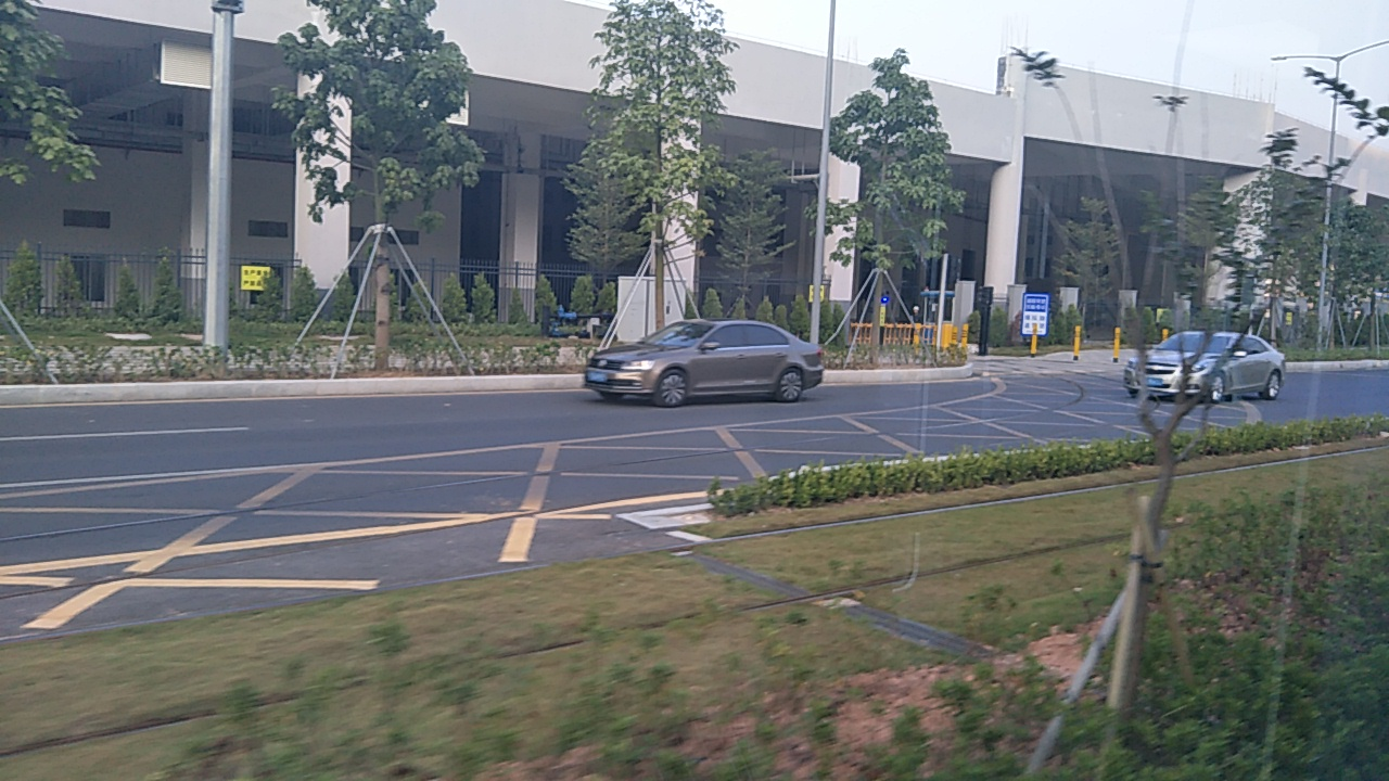 深圳有轨电车横坑车辆段及出入库线，位于龙华区